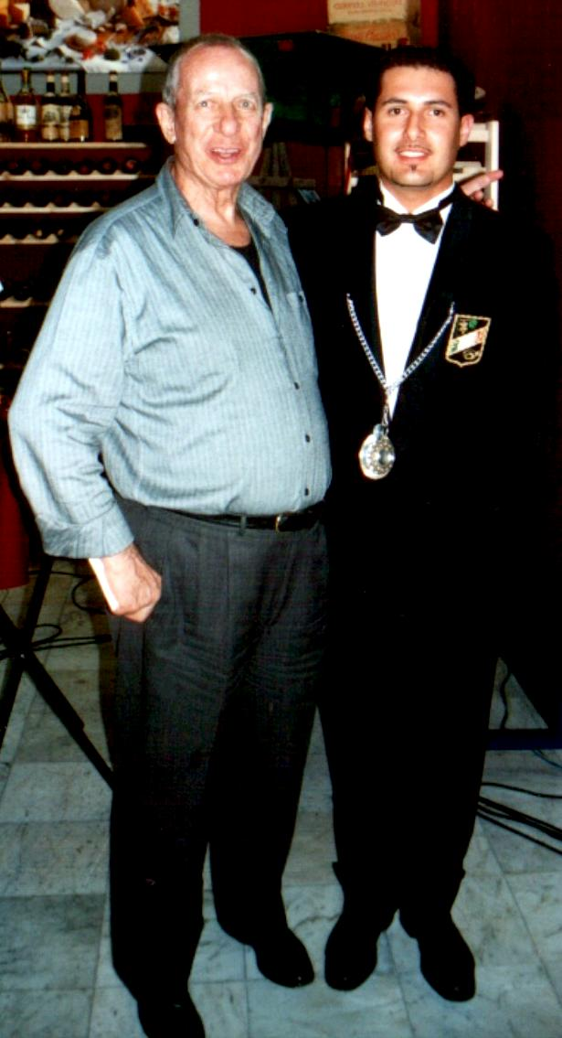 Luigi Veronelli e un sommelier Fisar